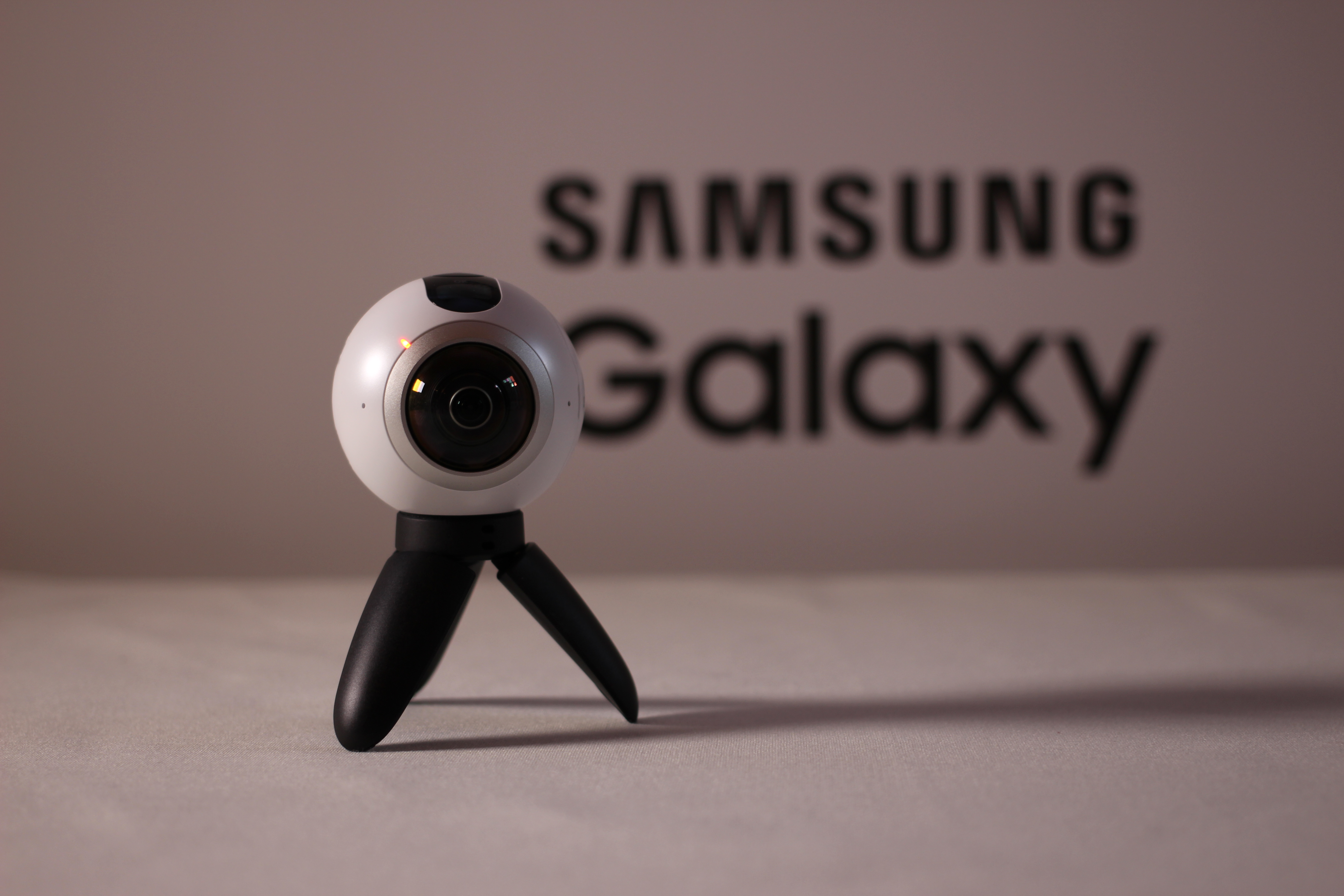 Samsung Gear 360 camera